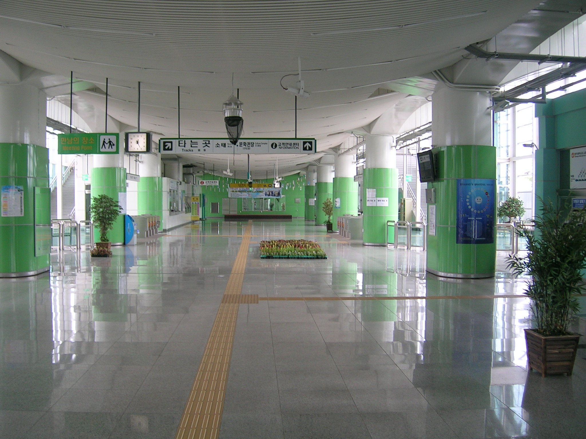 평동역2